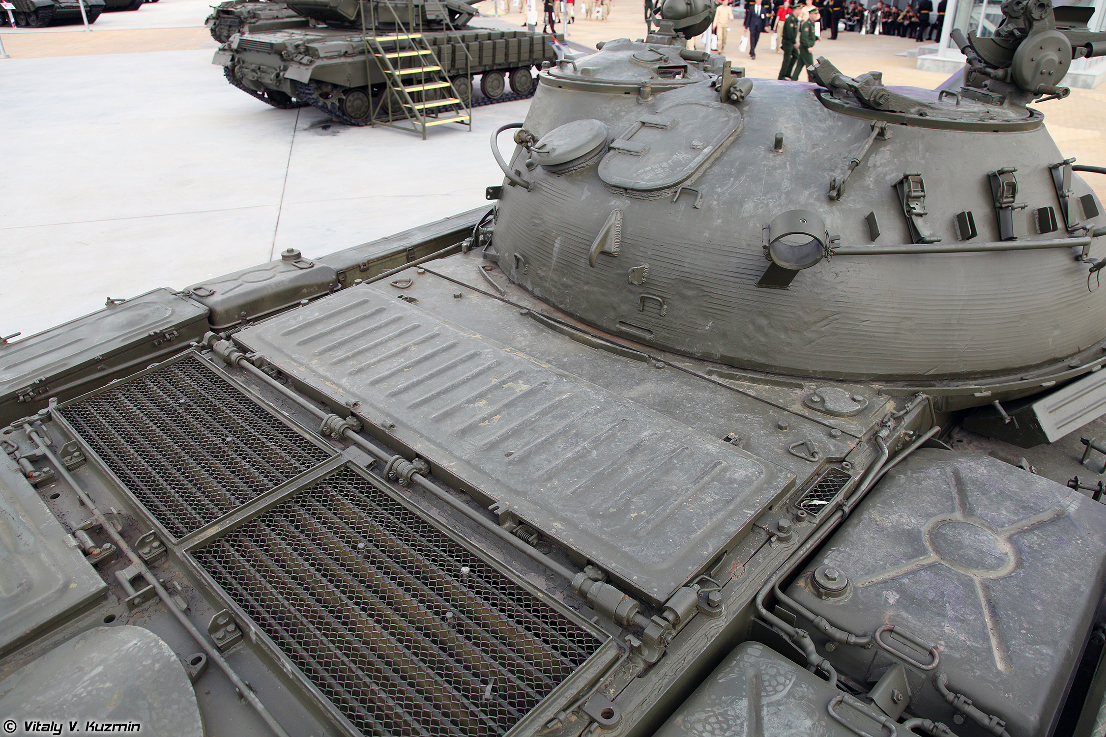 Т-62 обр. 1972г. (T-62 mod. 1972)